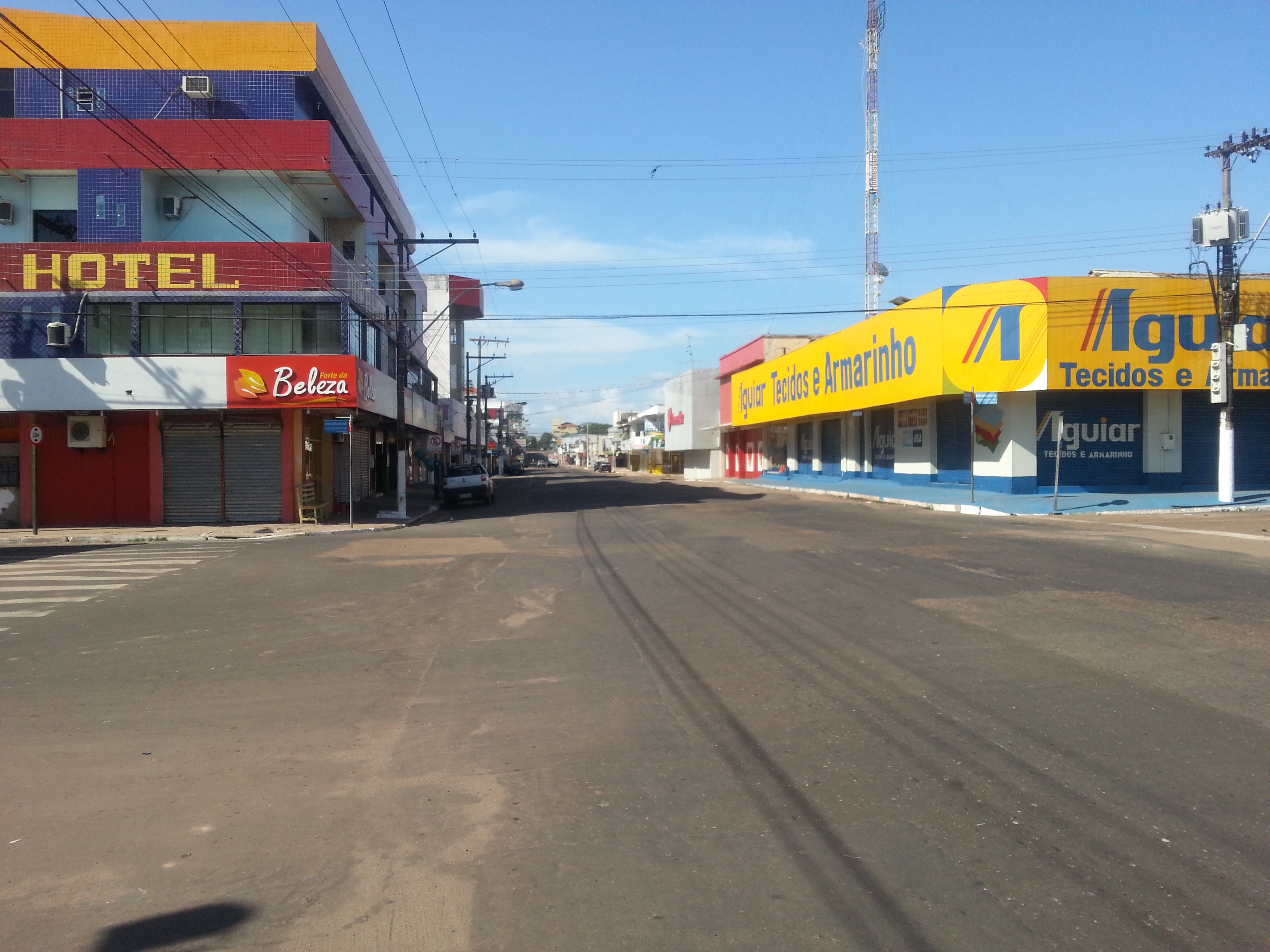 Central, Macapá - AP, Brazil